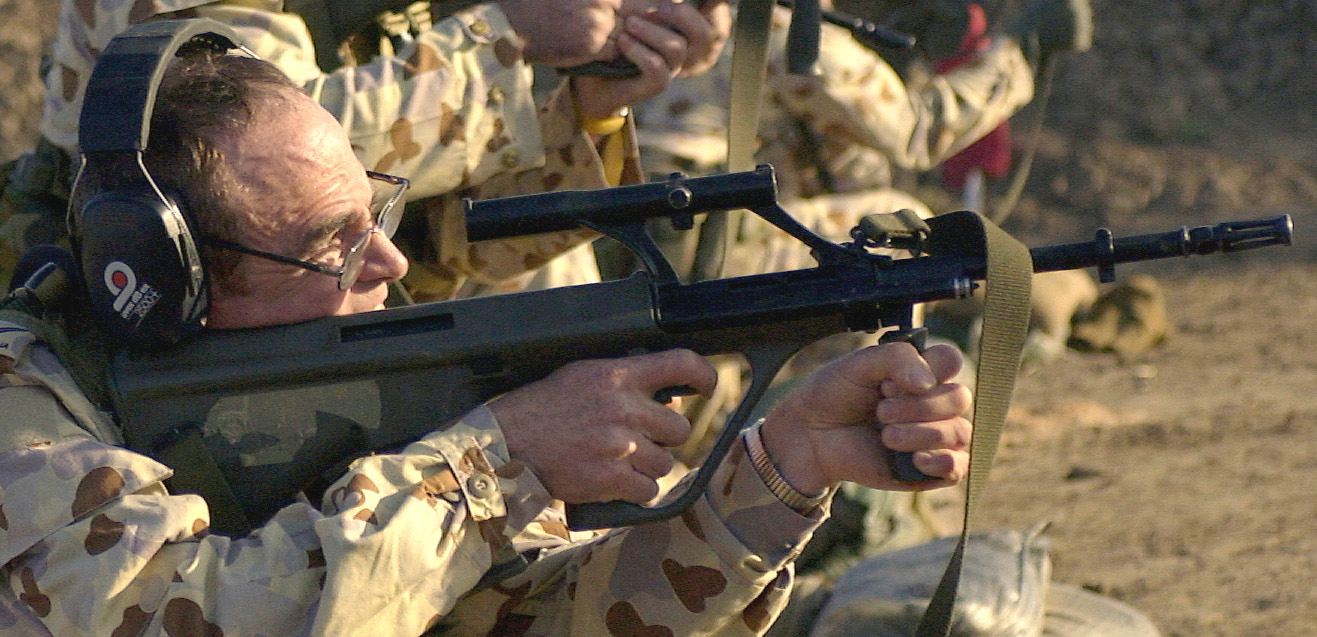 Steyr AUG (F88) rifle